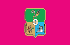 Прапор Дергачівського району